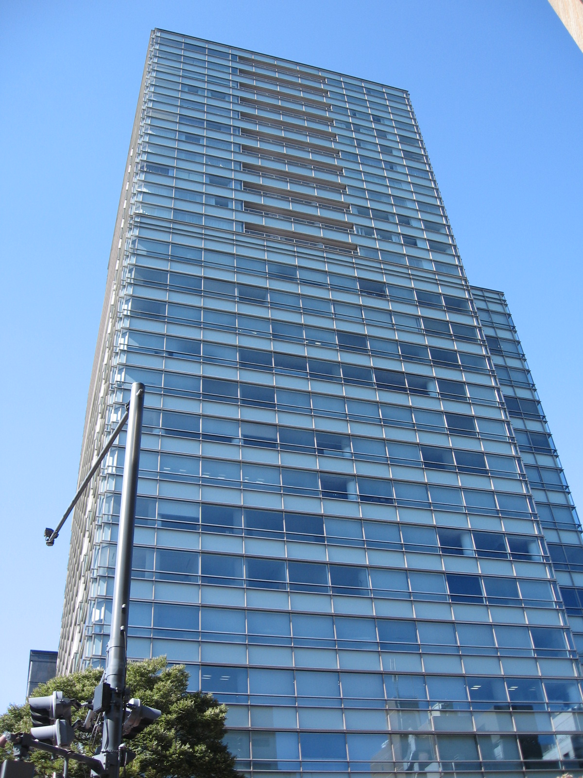 MSD（日本法人）東京本社（千代田区）